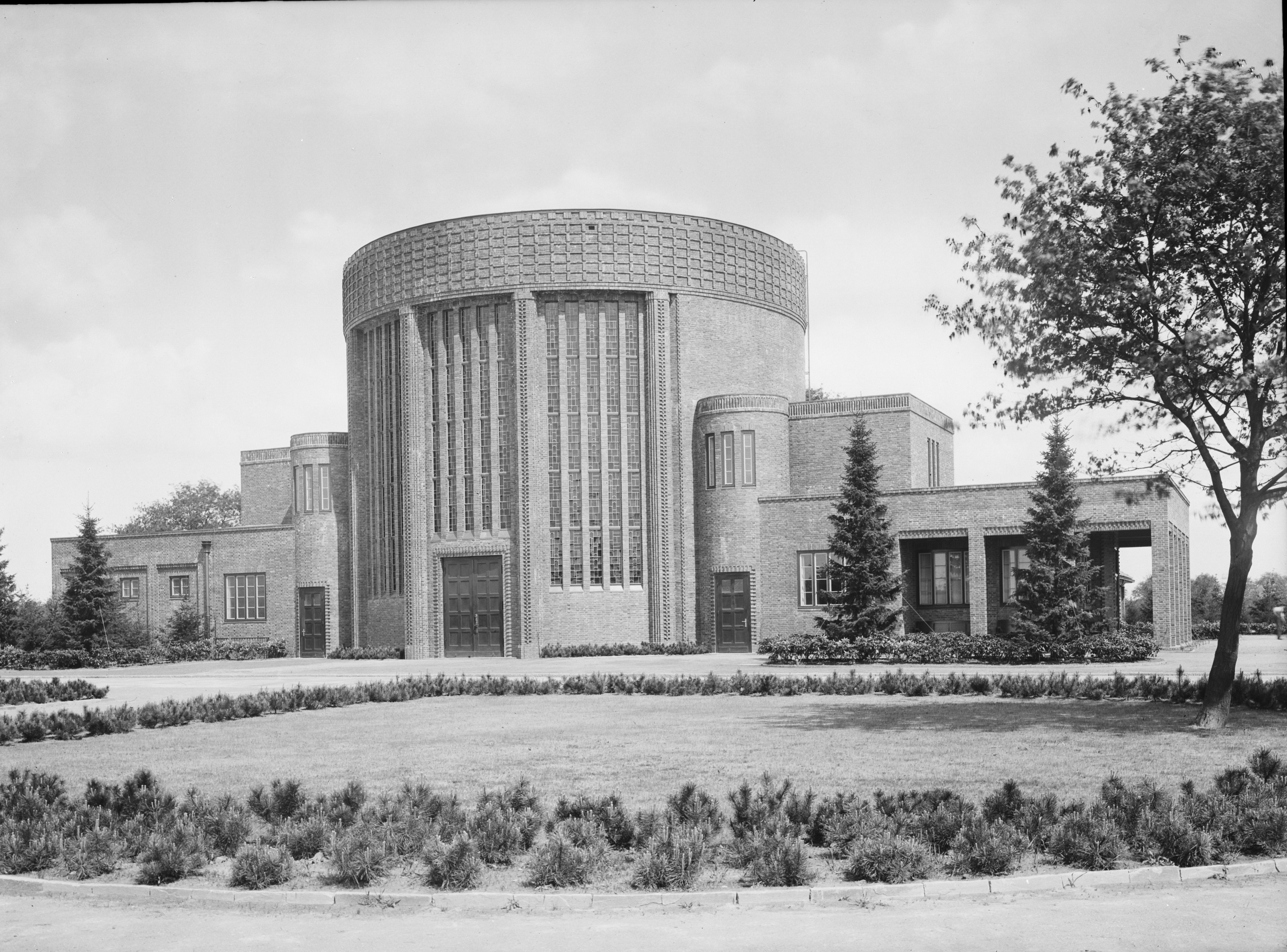 Kapelle 13 (Hamburg-Ohlsdorf): Vorderansicht (etwas seitlich gesehen) SchumacherWV Nr. 253